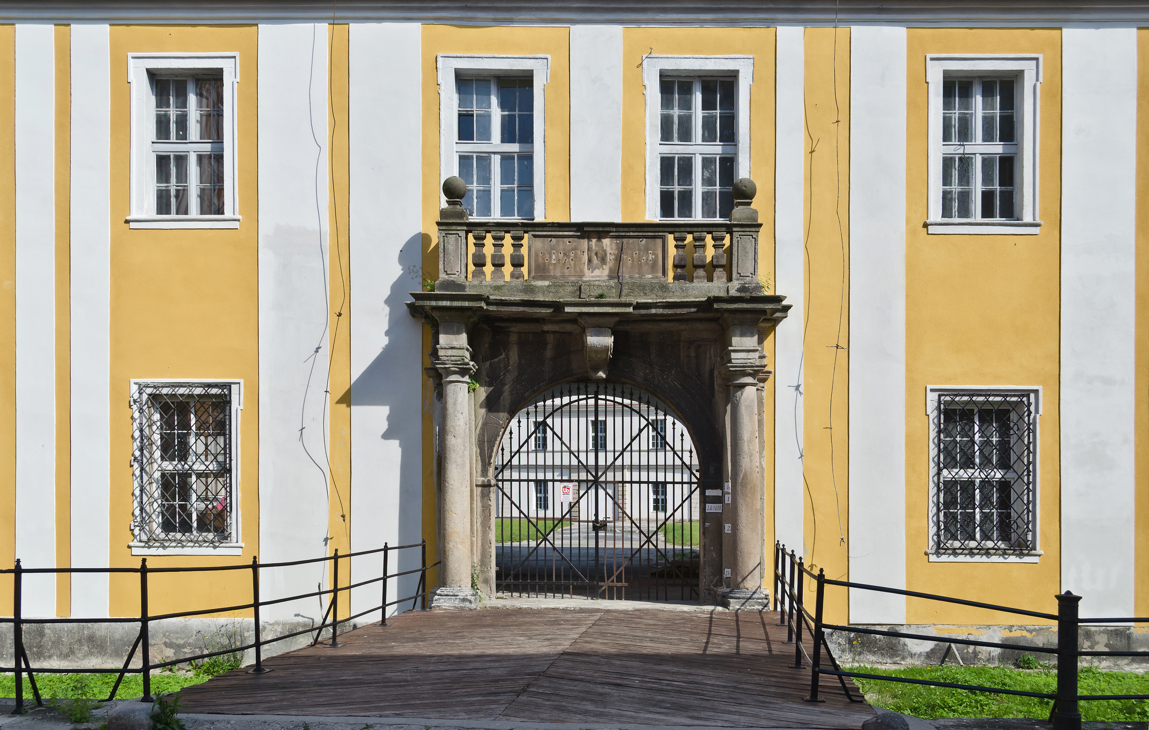 Nysa, zespół dworu biskupiego, XVII, XIX, po 1950